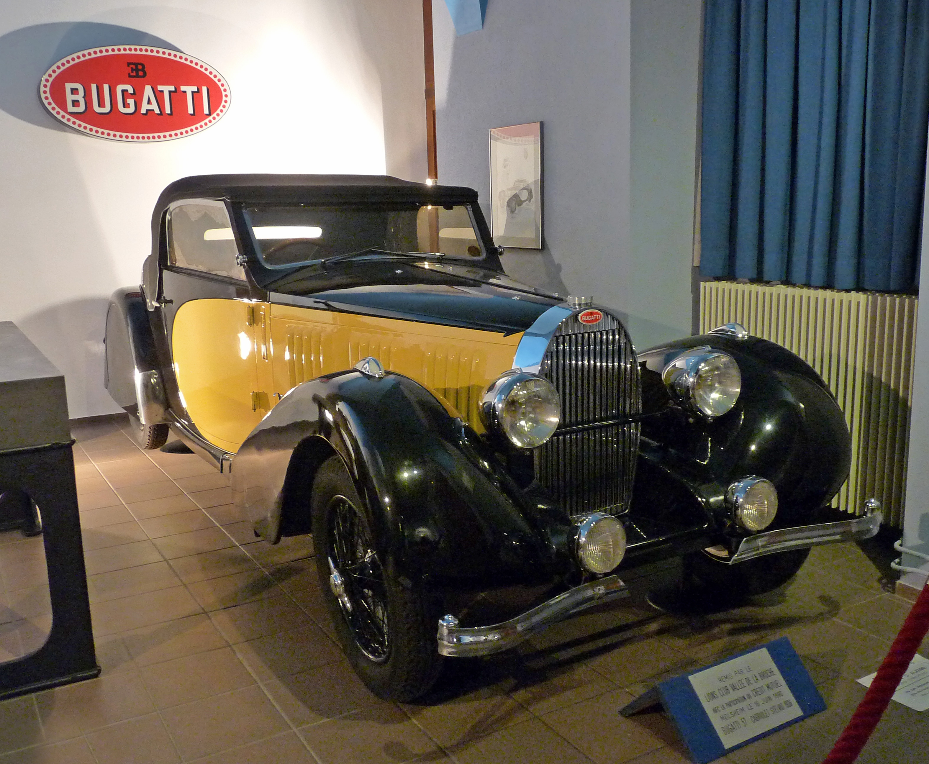 Fondation Bugatti (Molsheim) : Bugatti 57 cabriolet Stelvio (1936)